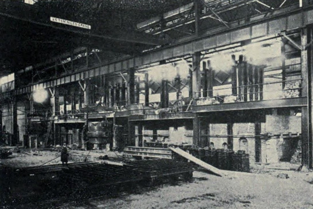 日本の近代的伸銅工業の創始たる大阪製銅株式会社を買収して、住友伸銅場の中之島分工場とする。のちの住友金属工業